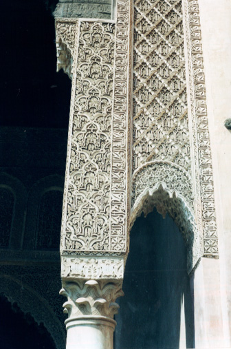 Decorazione in stucco, ad arabeschi - Marocco, Marrakech, Tombe Sadiane